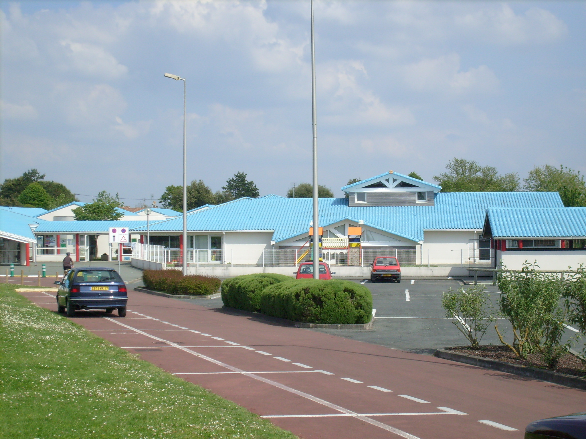 Ecole de Saint-Palais sur mer, Charente-Maritime